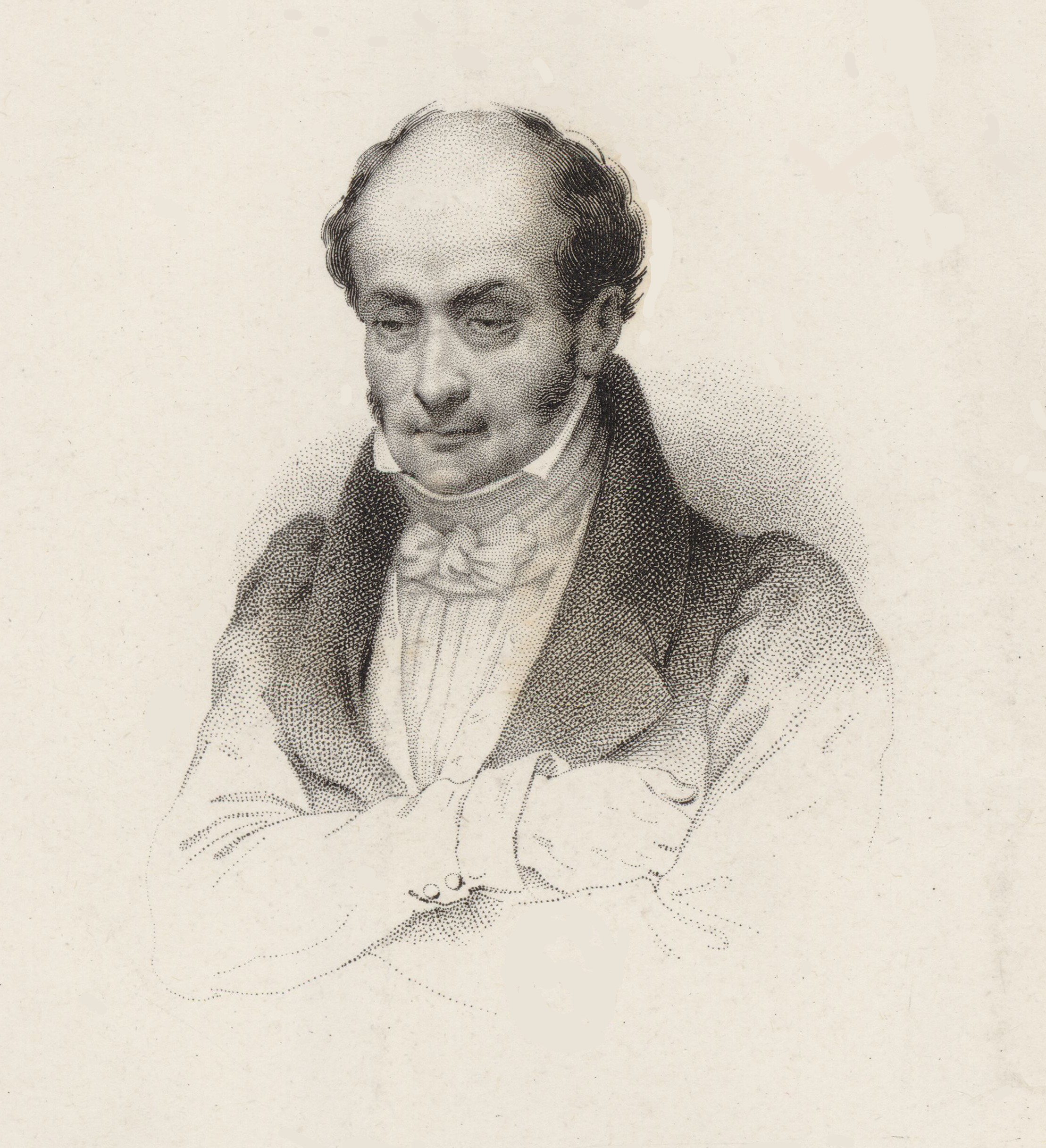 Chantelauze